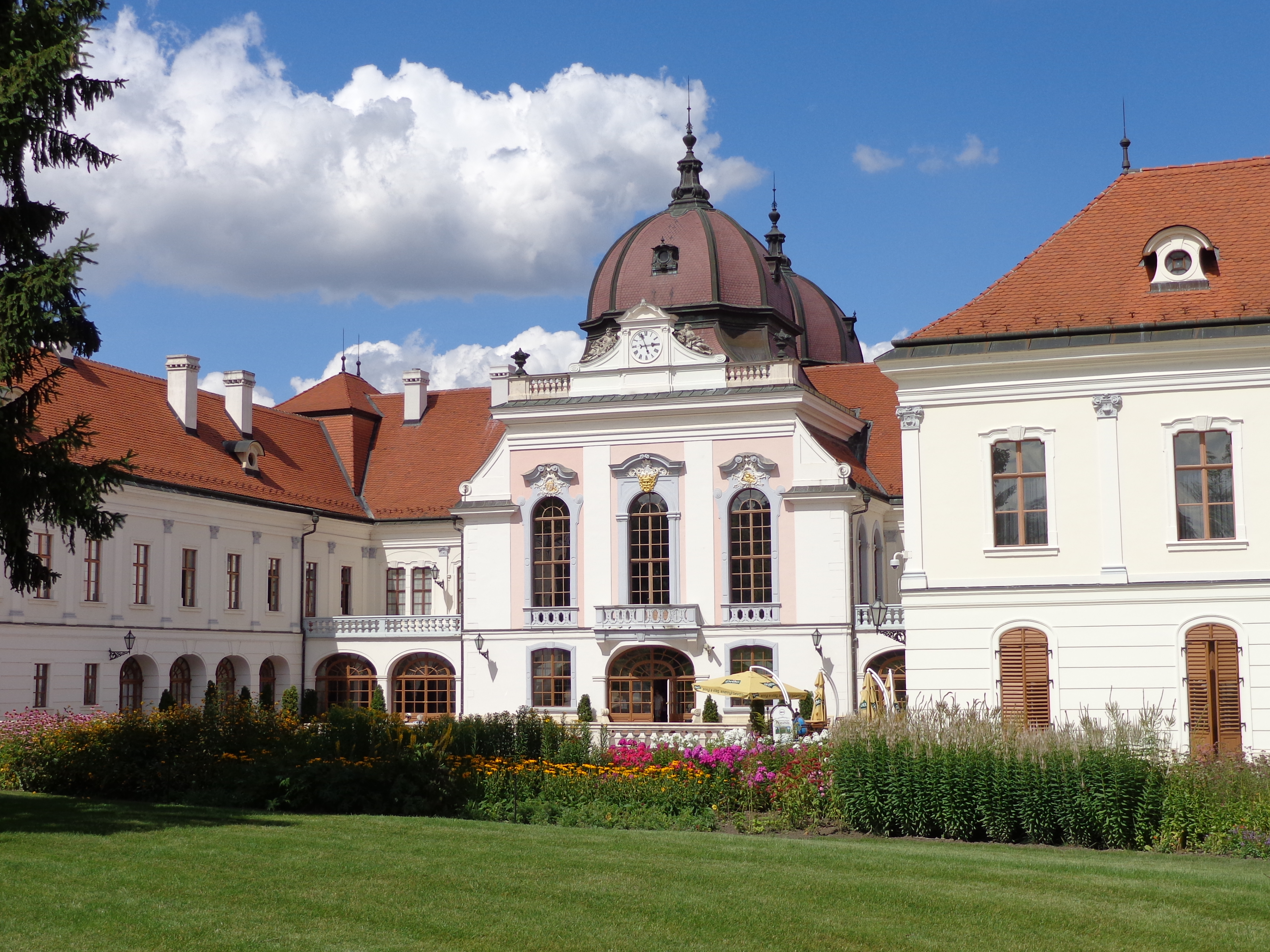 Grassalkovich-kastély együttese és parkja This is a photo of a monument in Hungary. Identifier: 7051